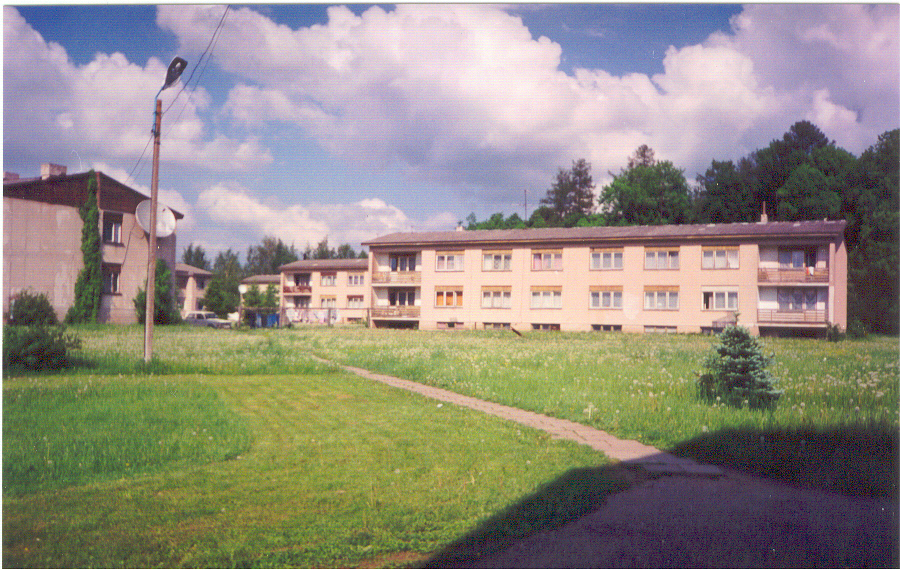 Blokkbebyggelse i Pargi - Karksi anno 1995. Foto: Jan-Erik Løken.